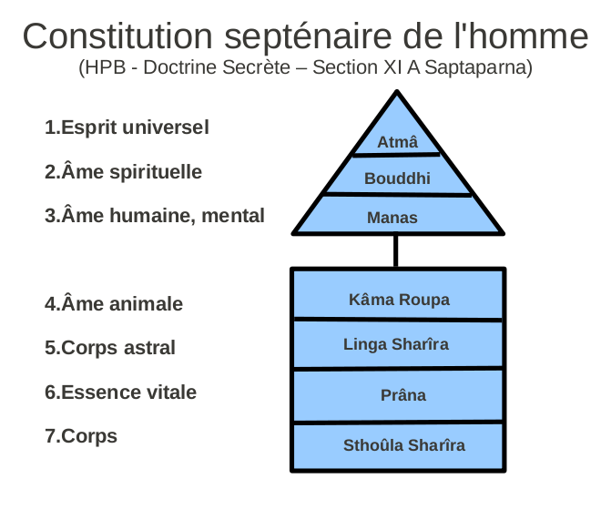 Selon la doctrine secrète d'Helena Blavatsky, volume 4 section X1, A - Saptaparna. ATMA / BOUDDHI / MANAS / KAMA MANAS / LINGA SHARIRA / PRANA SHARIRA / STULA SHARIRA